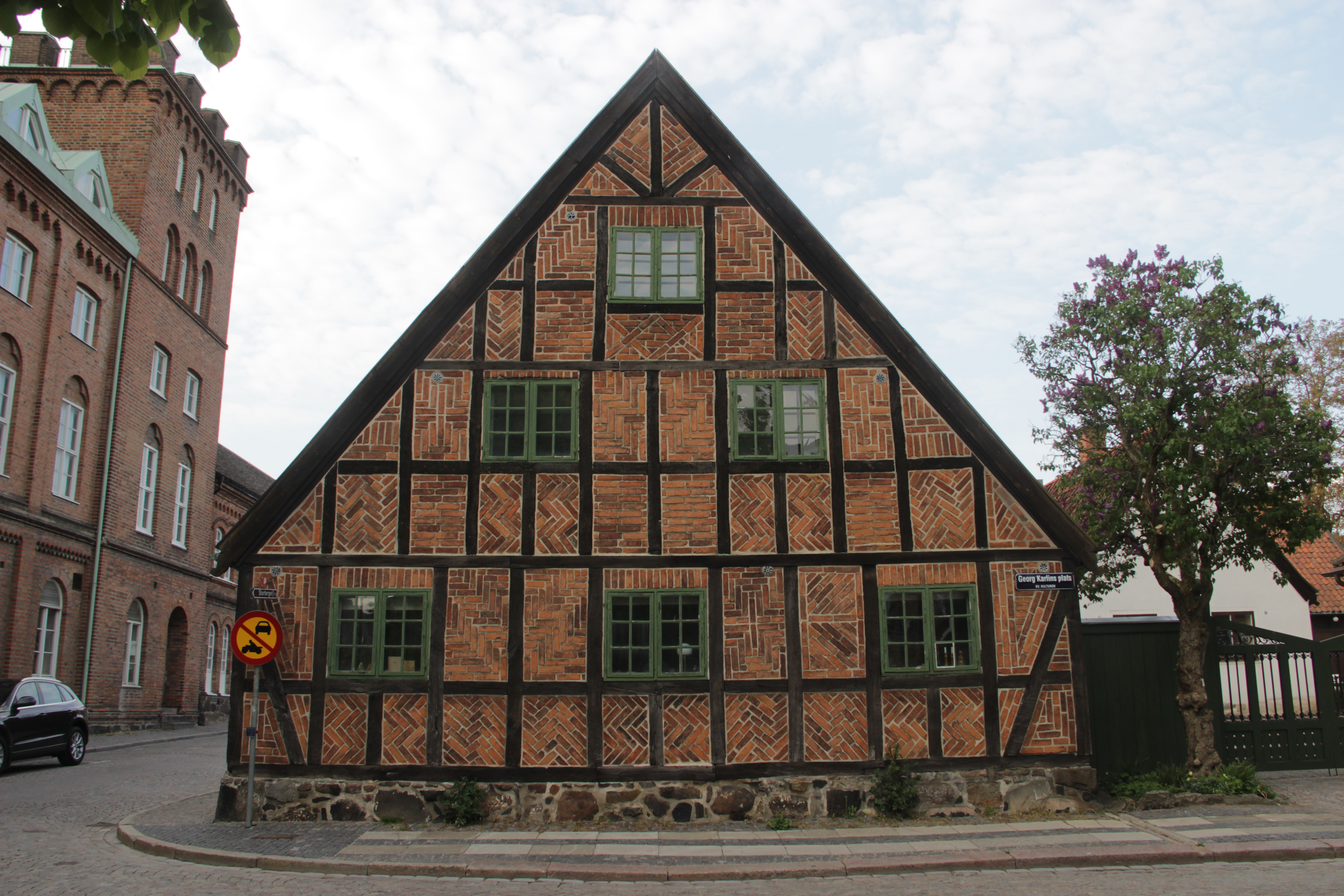 Locus Peccatorum at Kulturen in Lund